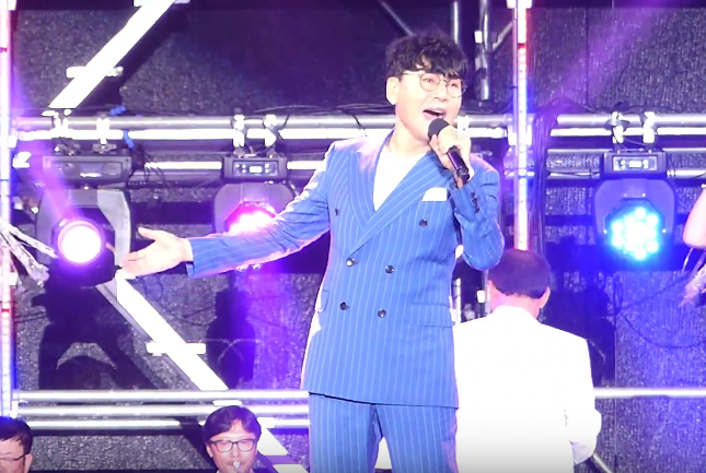 2016년 8월 7일 현인가요제에서 조항조.